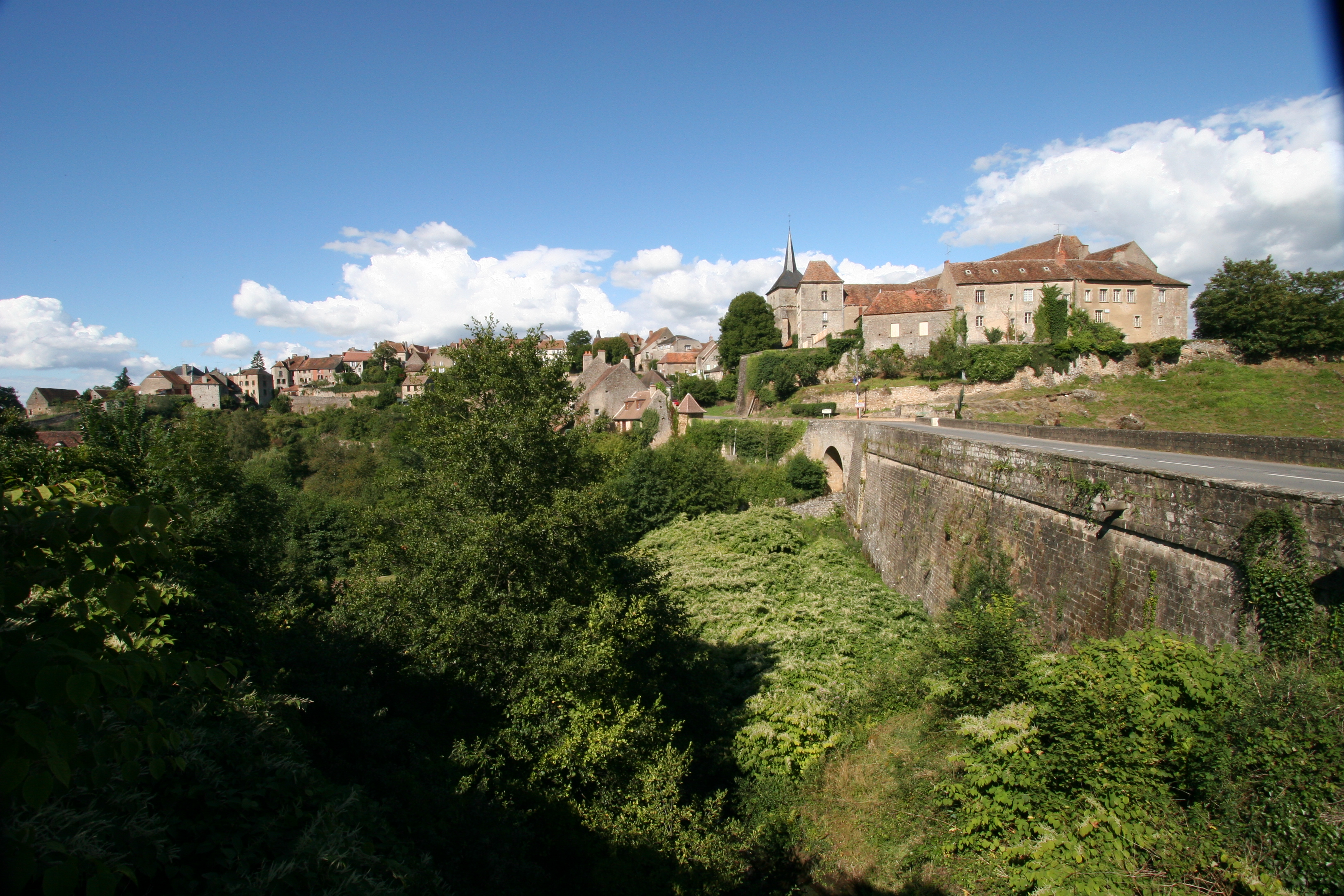 Saint-Benoît du Sault, Indre, France. Vue générale